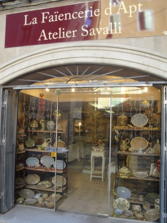 La faiencerie d'Apt